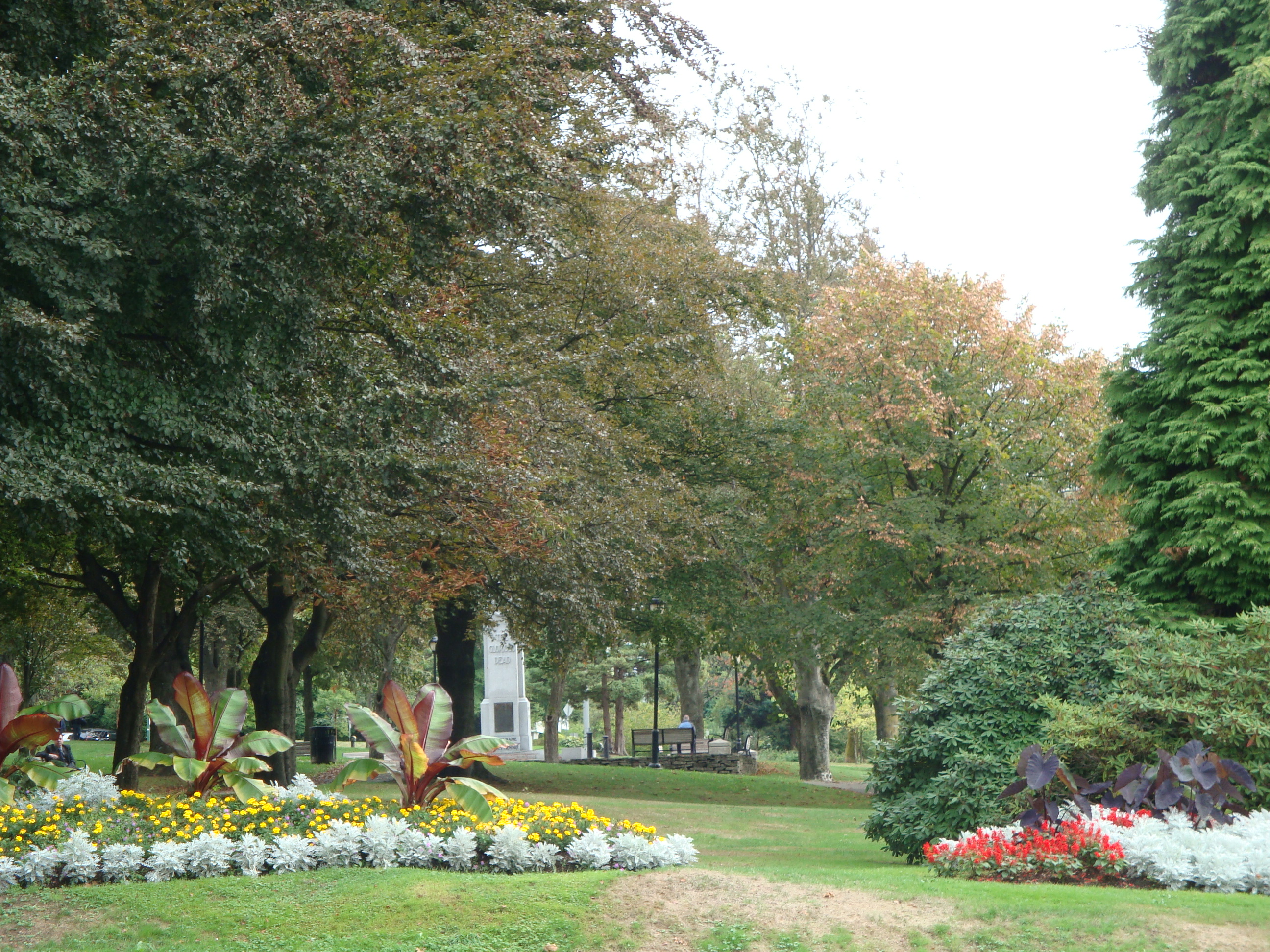 Victoria Park, 650 Lonsdale Avenue, North Vancouver (Canada). (Protection Community Heritage Register. Voir la liste des lieux patrimoniaux de North Vancouver (ville) pour plus de détails).